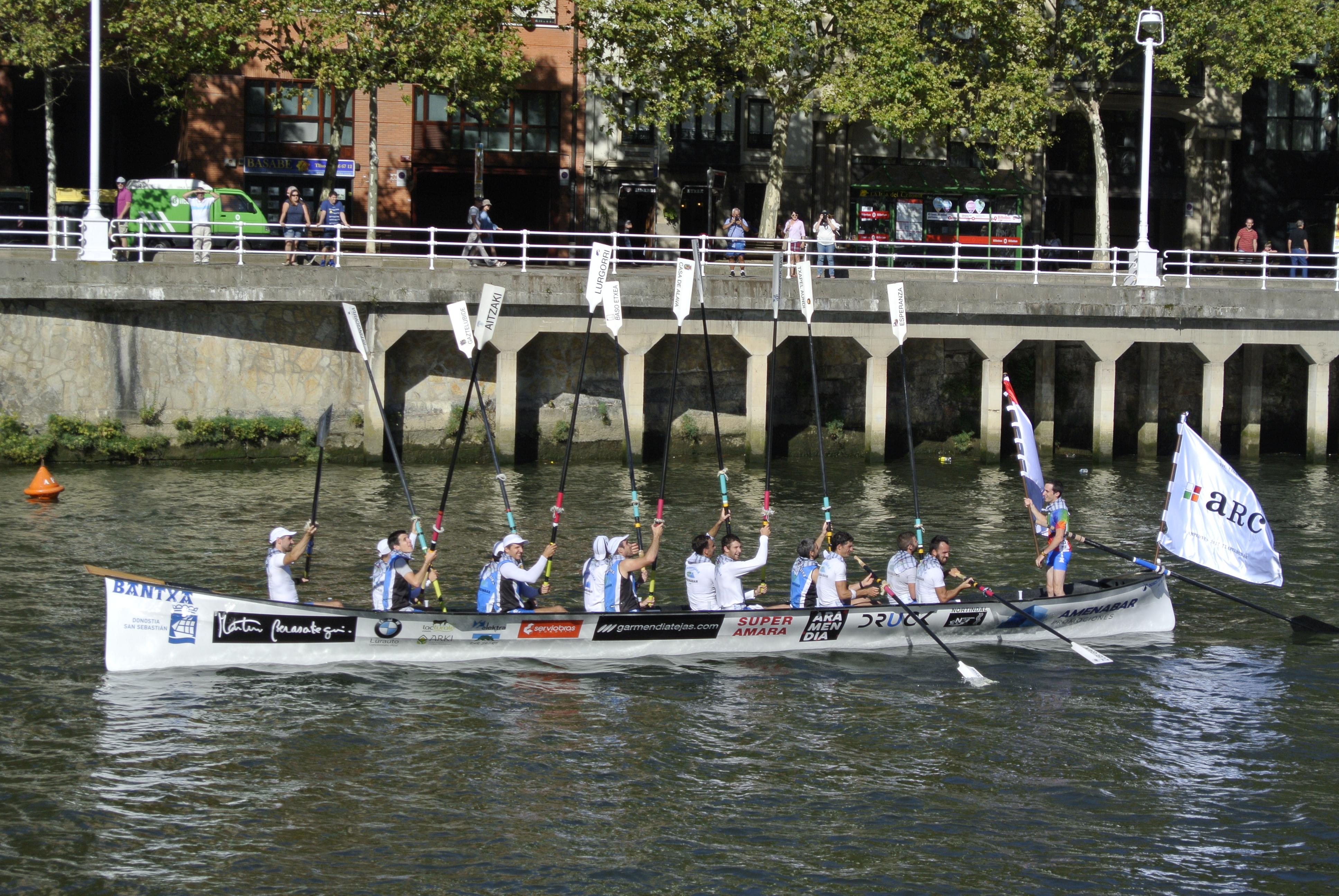 Kaiarriba Arraun Elkartea vencedor de la liga ARC-1